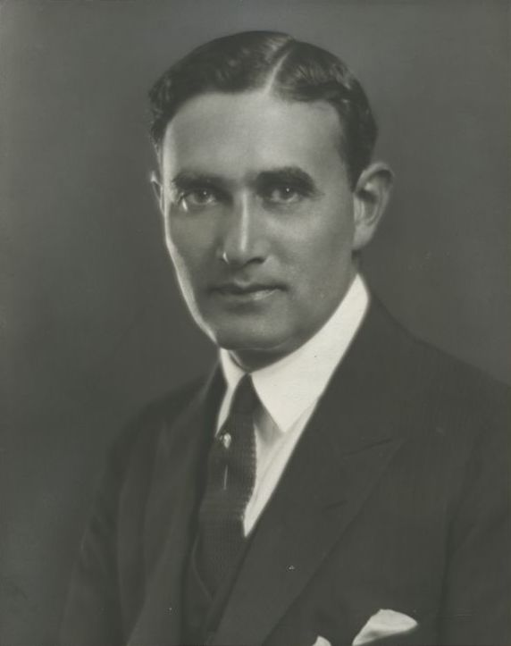 Portrait of Edgar Selwyn